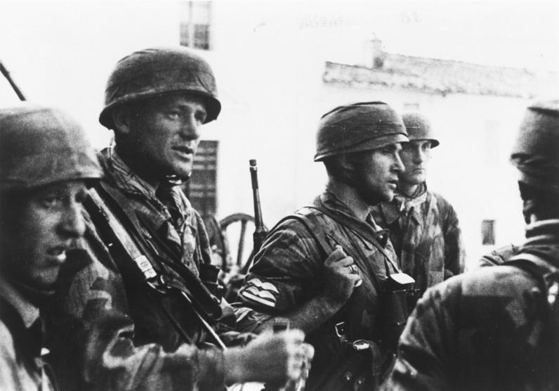 Im italienischen Raum kämpfen unsere Fallschirmjäger gegen Briten und Amerikaner. Ein Stosstrupp, der in einem kleinen Ort eine schwierige Aufgabe durchzuführen hatte, sammelt sich am verabredeten Platz und bespricht den weiteren Verlauf der Unternehmung. Pk-Aufnahme Kriegsberichter Biedermann 21.10.1943